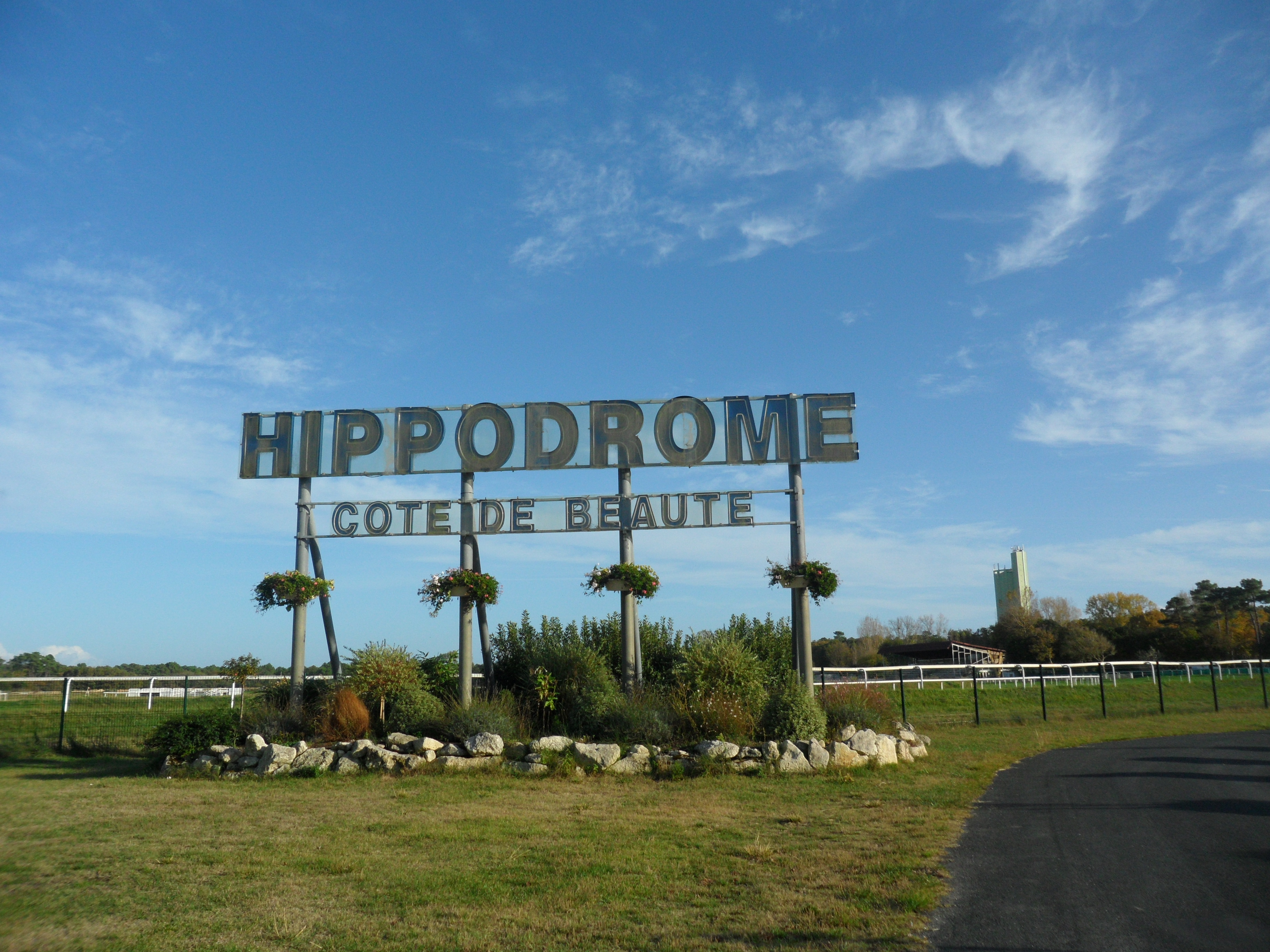 Hippodrome de la Côte de Beauté